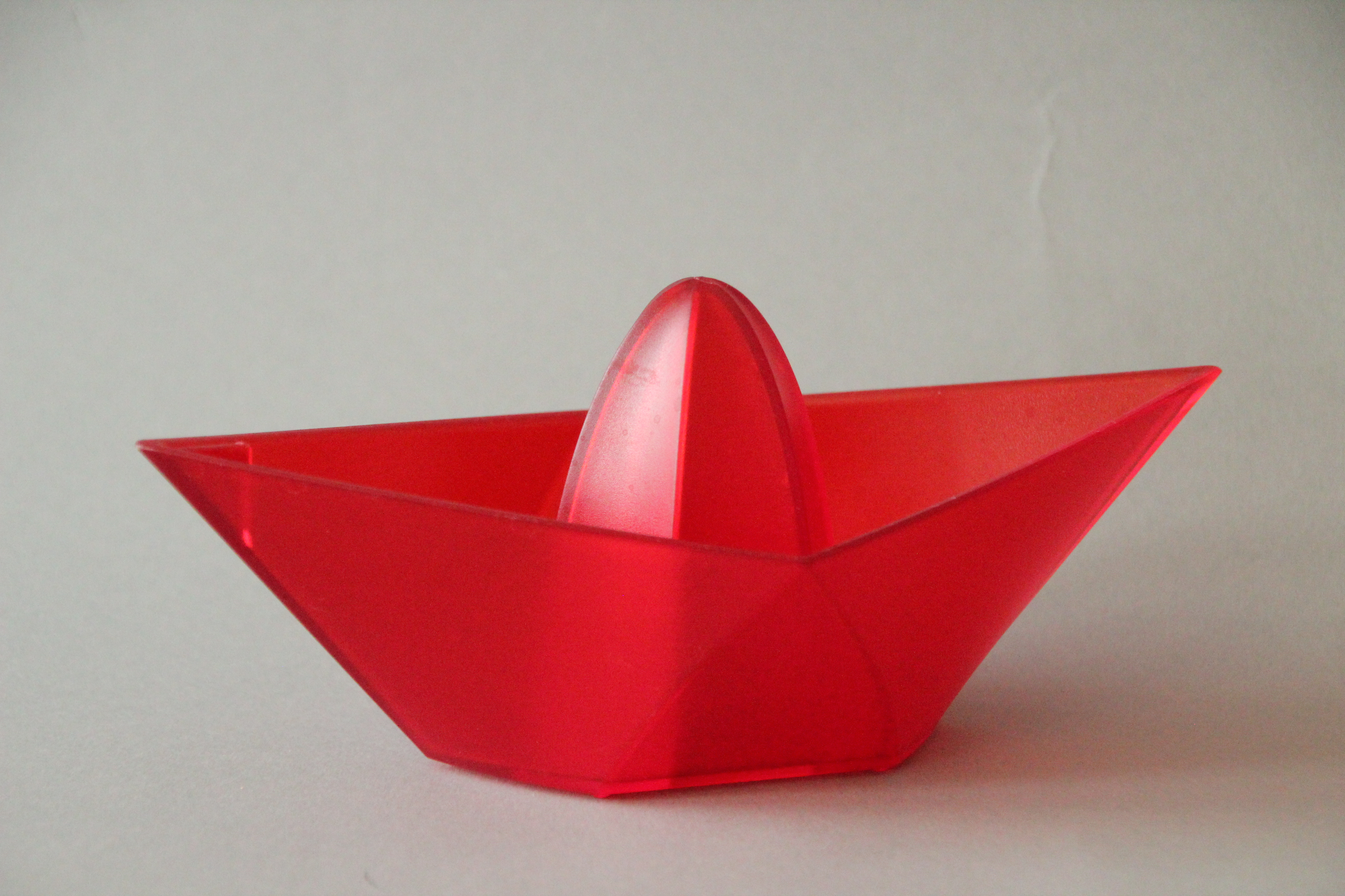 Bildinhalt: rote Zitruspresse "Ahoi" von Koziol auf grauem Hintergrund Aufnahmeort: Frankfurt am Main, Deutschland